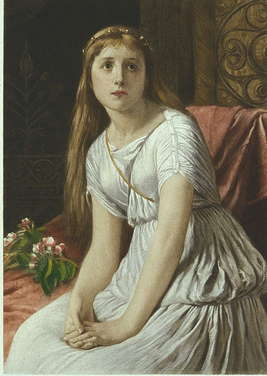 Cordelia